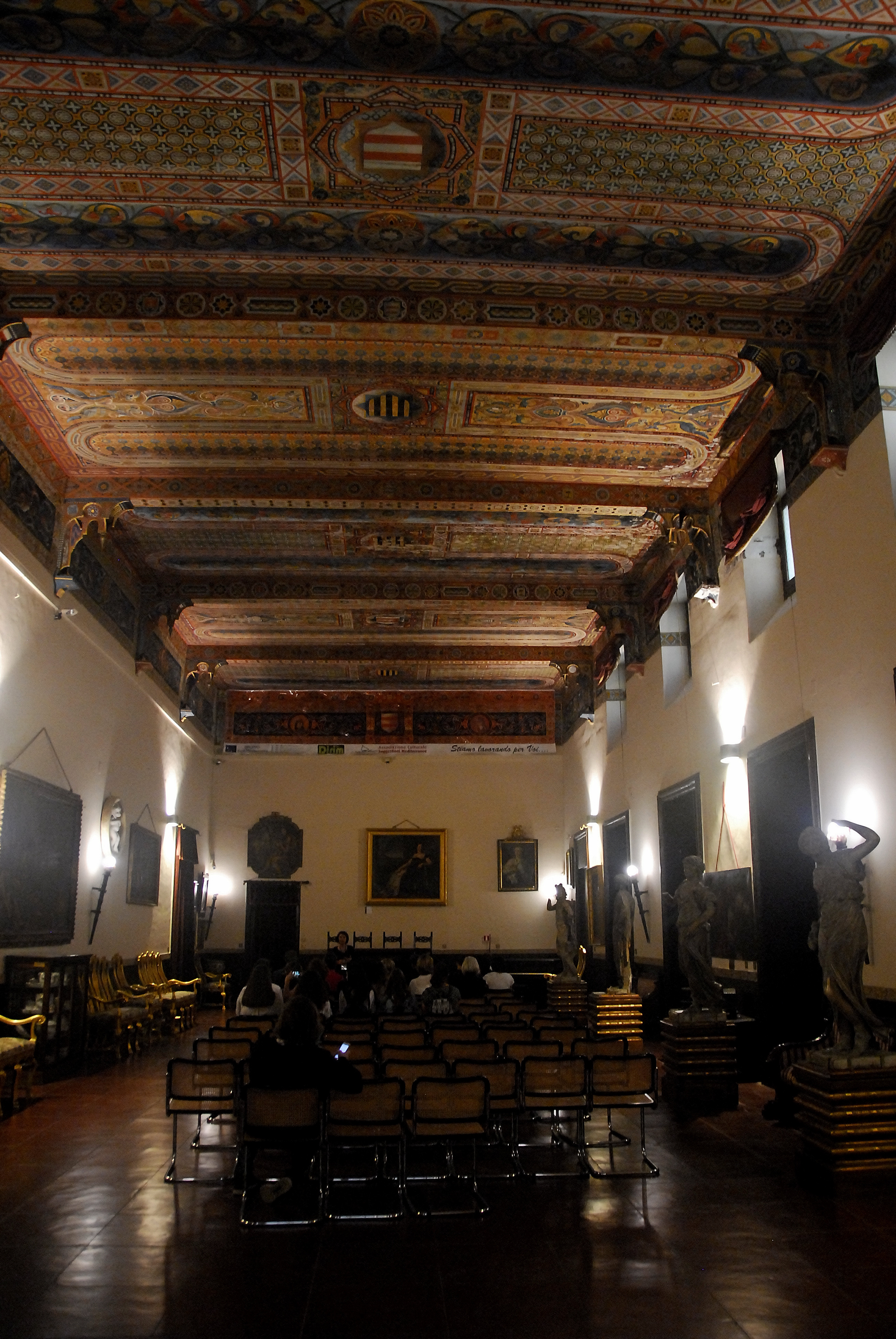 Palermo, ITA